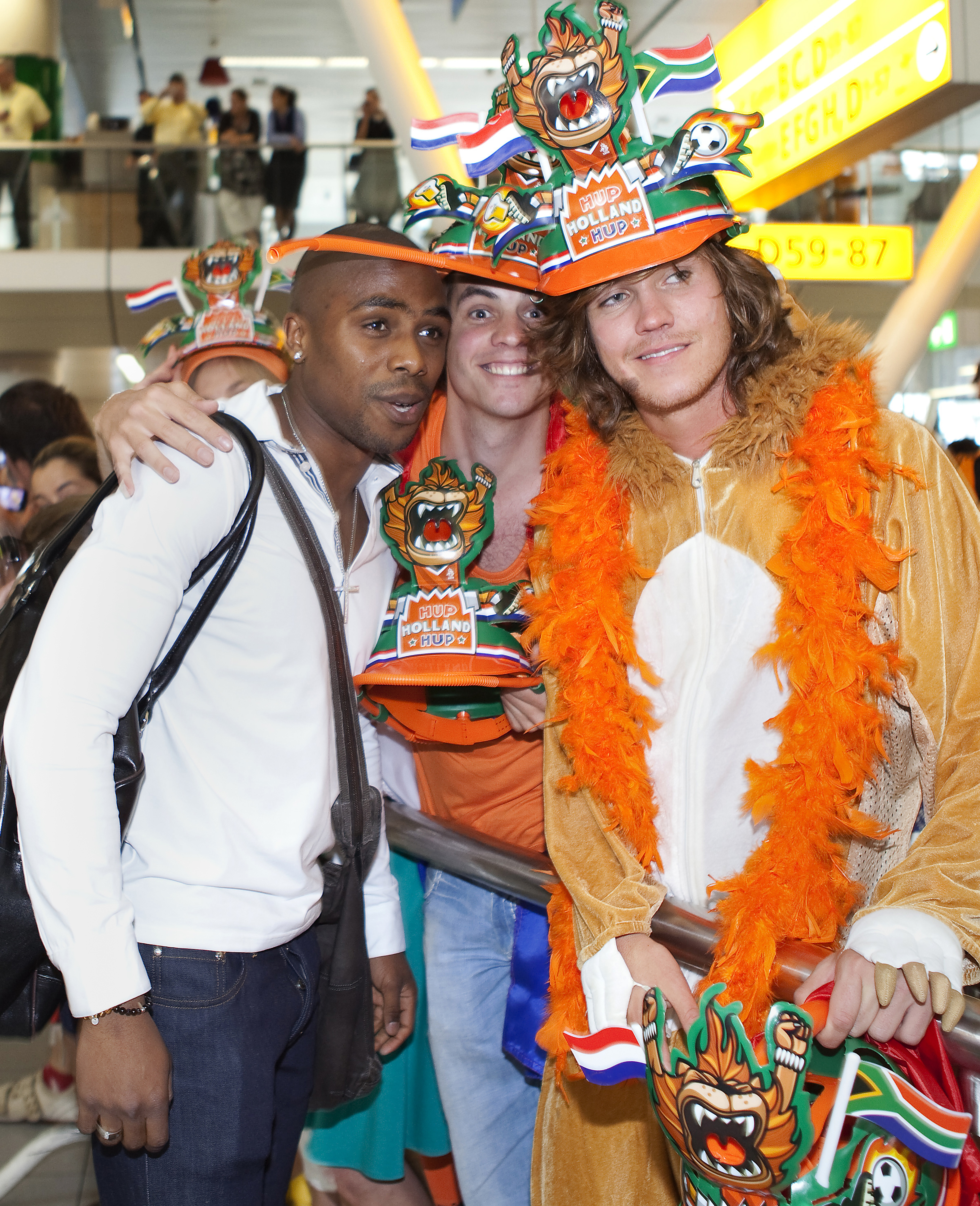 Edson Braafheid